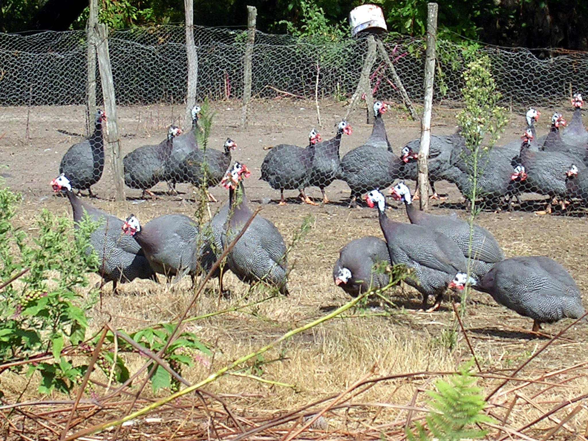 Elevage de pintades à Bascons, dans le département français des Landes